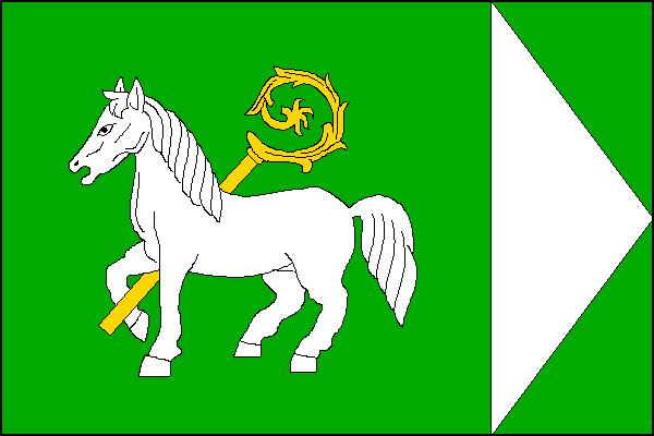 Vlajka obce Vysoká (okres Bruntál)